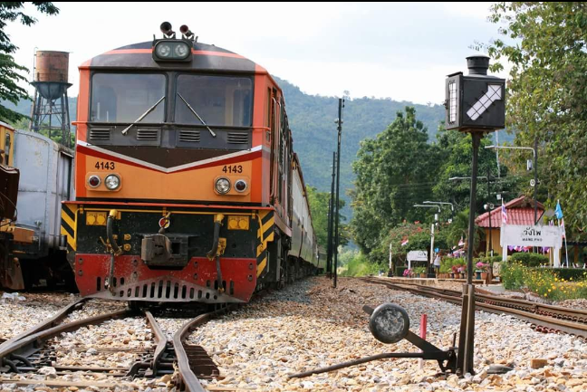 ขบวนรถไฟนำเที่ยว 910 จอดรอหลีก ภาพจากGoogle